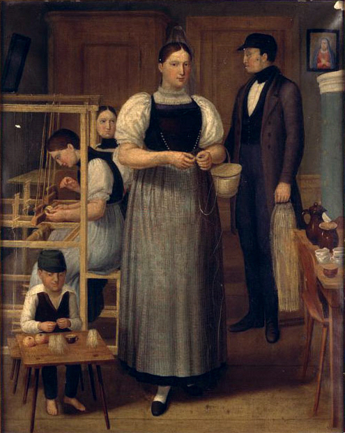 Freiämter Strohflechterfamilie in einer Bauernstube, um 1840. Öl auf Leinwand; 57 cm x 45 cm Schweizerisches Landesmuseum, Zürich